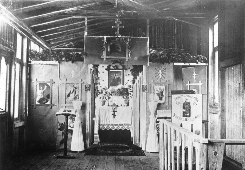 Wünsdorf! Bei den russischen Emigranten in Wünsdorf bei Zossen. Blick in die russische Emigranten-Kirche des Barackenlagers in Wünsdorf. 2.7.25 [Herausgabedatum] Wunsdorf! With the Russian emigrants in Wünsdorf near Zossen. View into the Russian emigrant church of the barracks camp in Wünsdorf. 2.7.25 [release date]